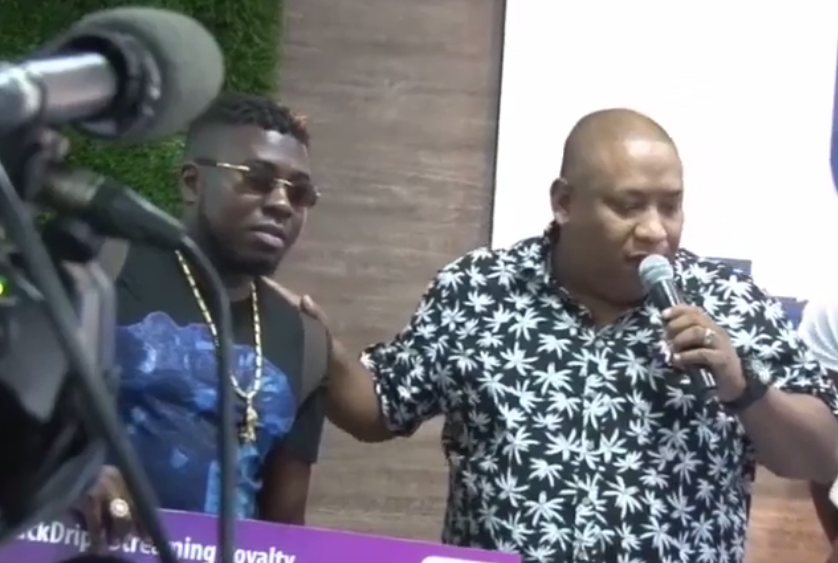 Damaru